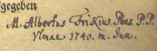 Vergrößerung des Erstbesitzereintrags von 1740